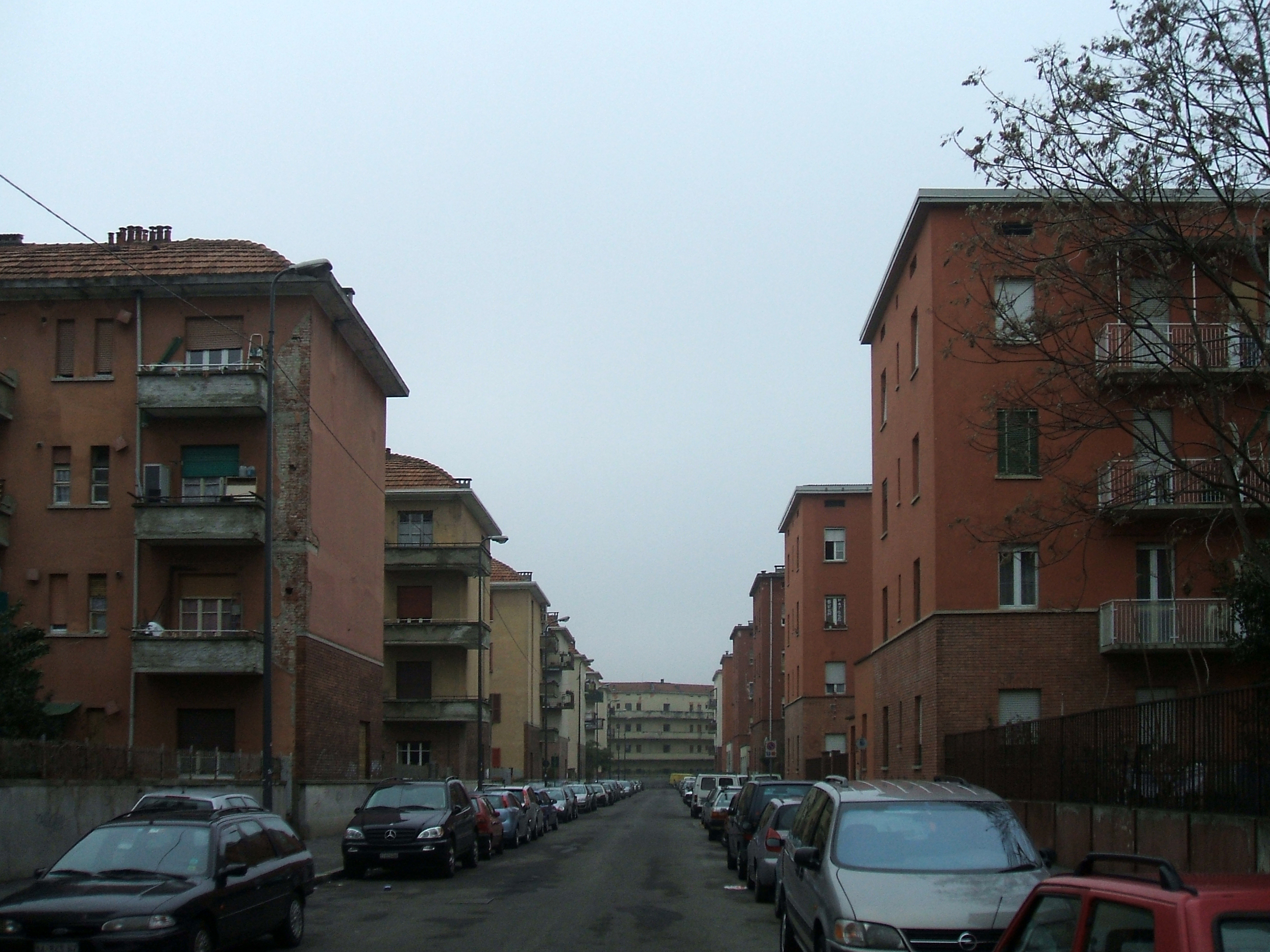 Alcune case popolari in via Apuli, nel quartiere del Giambellino, a Milano